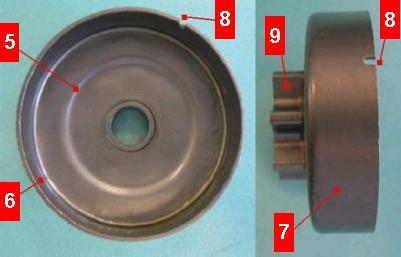 Водещо колело